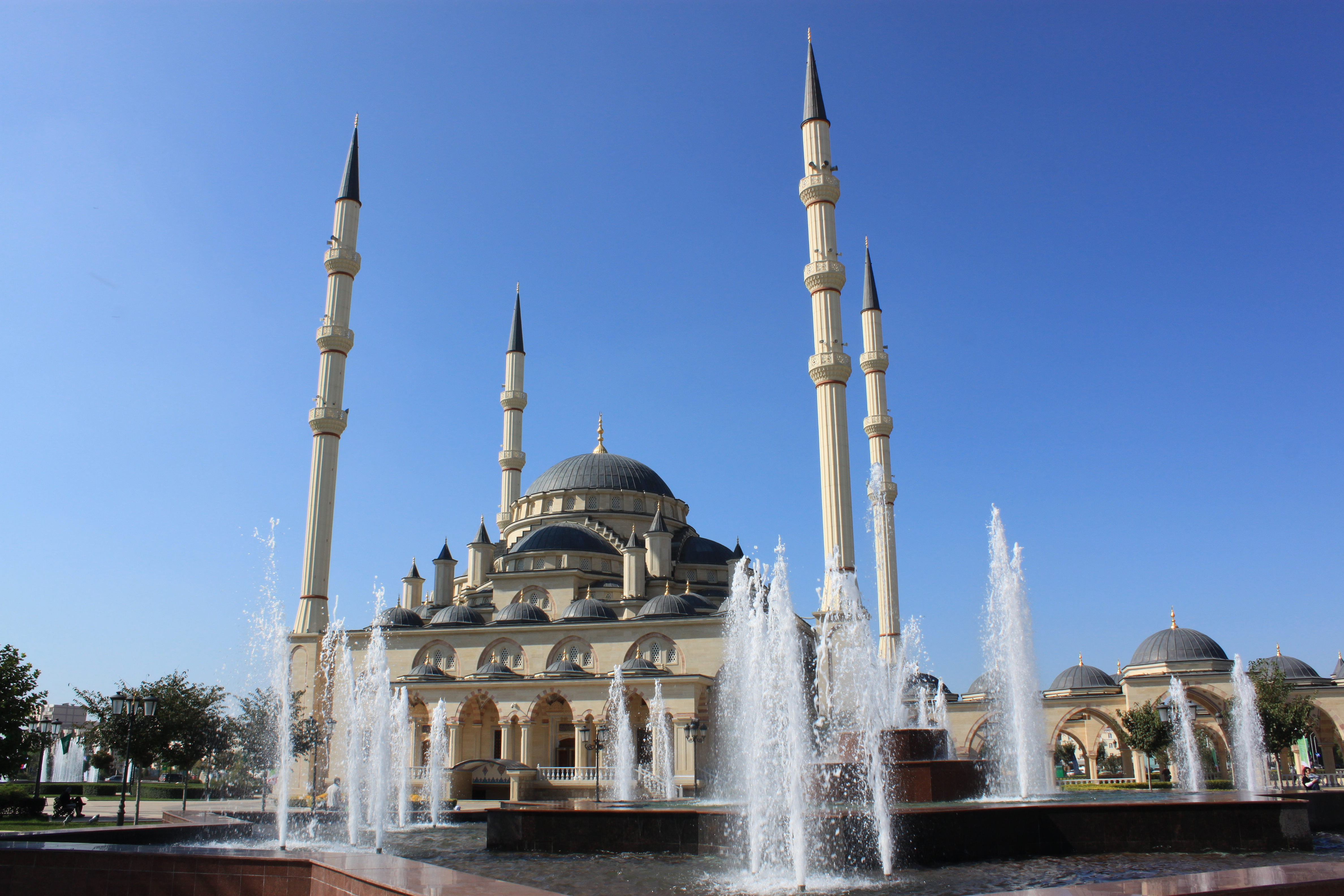 Грозный мечеть 2011